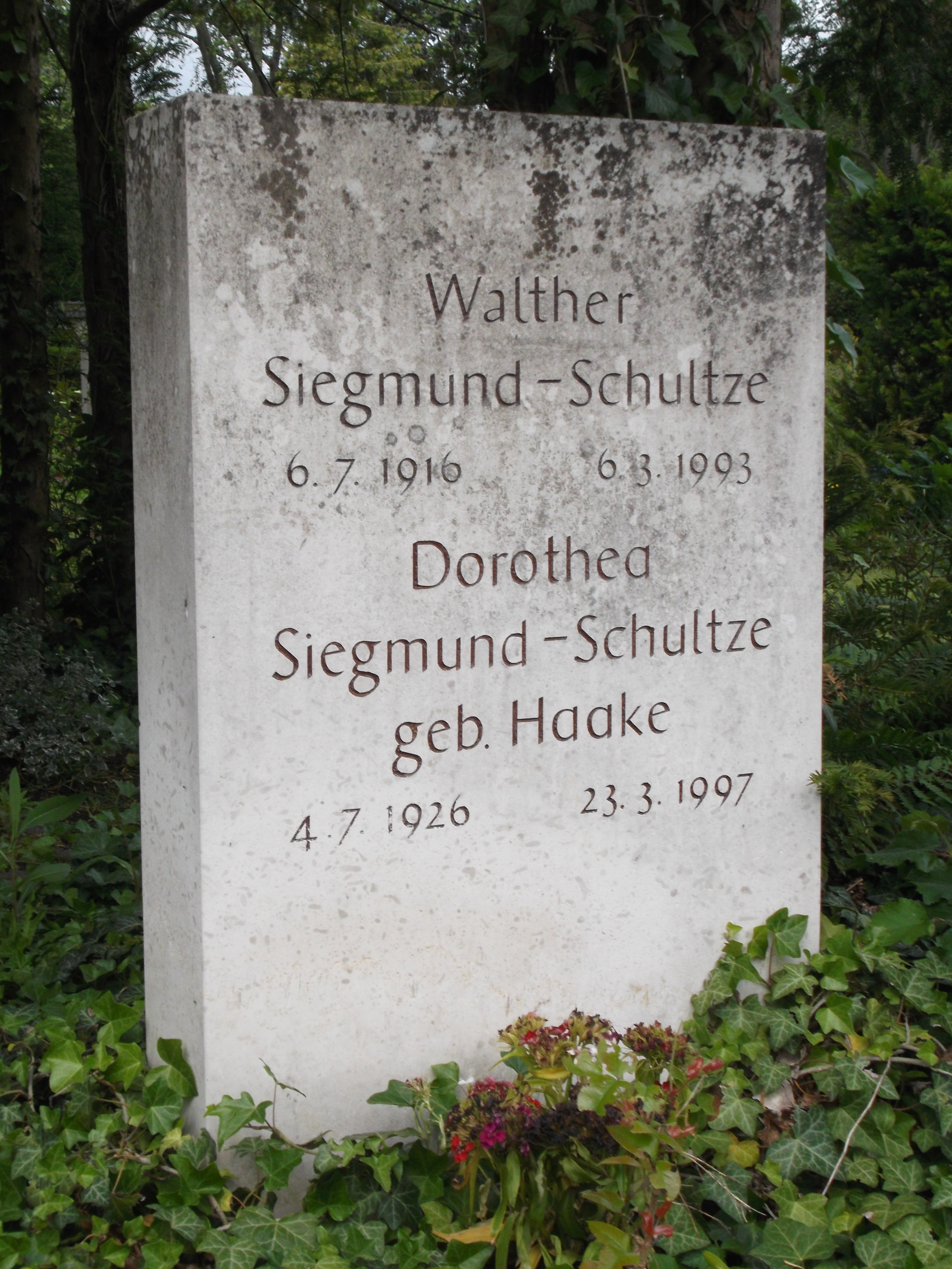 eigenes Foto